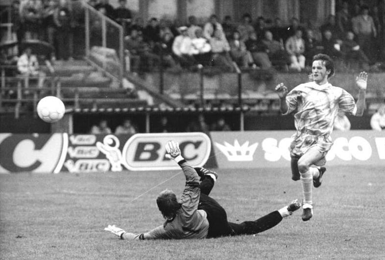 ADN-Bernd Settnik-5.9.90-Berlin: Oberliga FC Berlin - FC Hansa Rostock 0:3 (0:3) Rostocks Henry Fuchs erzielt in der 37. Minute das 0:3 aus Berliner Sicht. Torwart Andreas Nofz ist ohne Chance. Auch das Führungstor der Hanseaten hatte Fuchs schon in der 9. Minute besorgt.